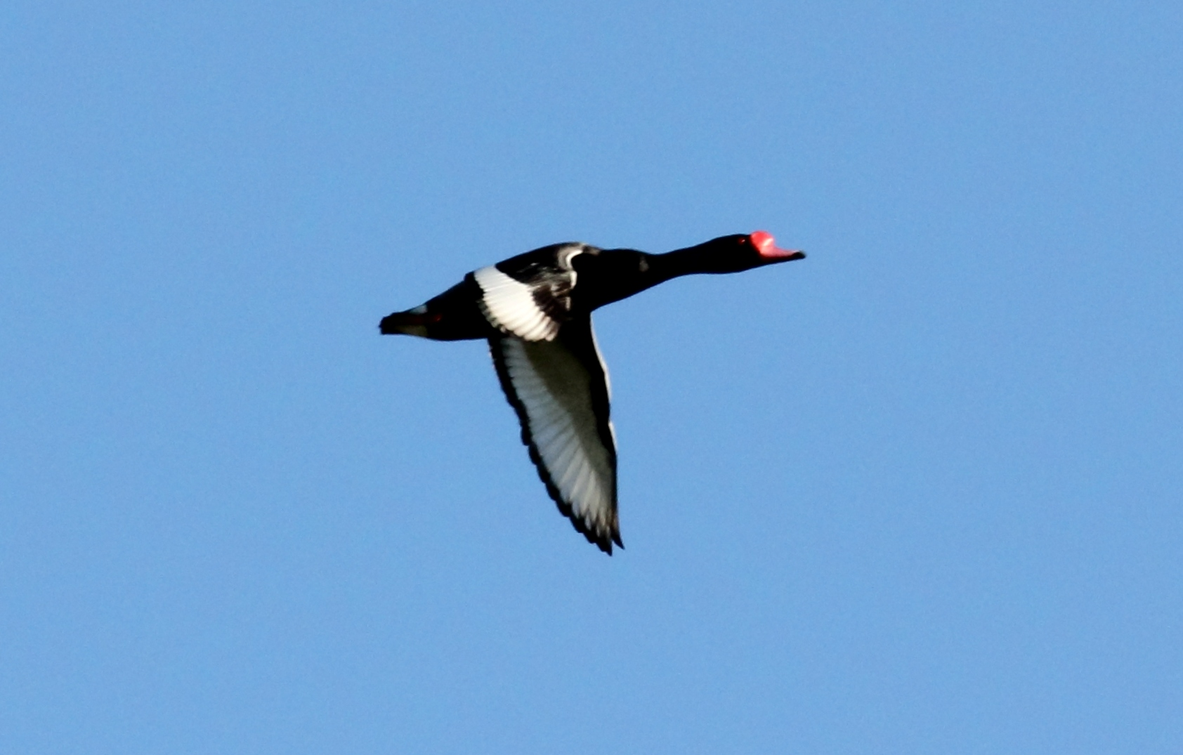 Rosy-billed Pochard (Netta peposaca)